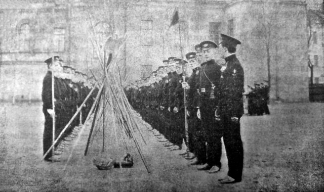 Разведчики-гимназисты во дворе 1-й Санкт-Петербургской гимназии